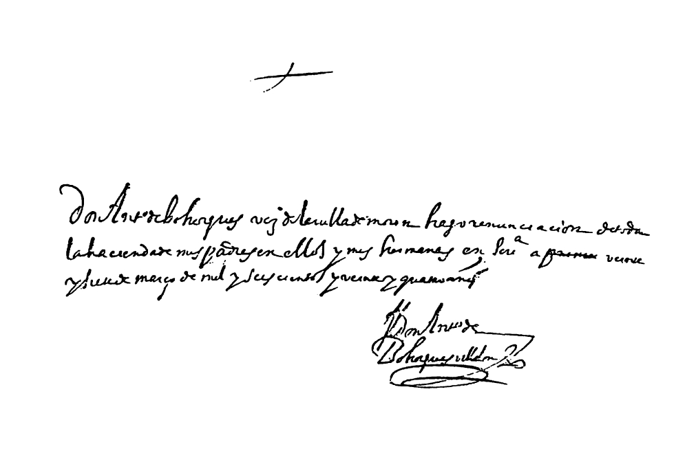 Autógrafo de Antonio Bohorques Villalón, vecino de Morón, firmado en Sevilla el 27 de marzo de 1624 renunciando a la hacienda de sus padres